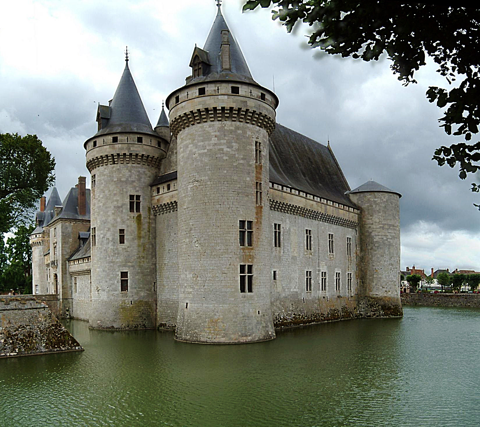 Château de Sully-sur-Loire, Loches, FRANCE